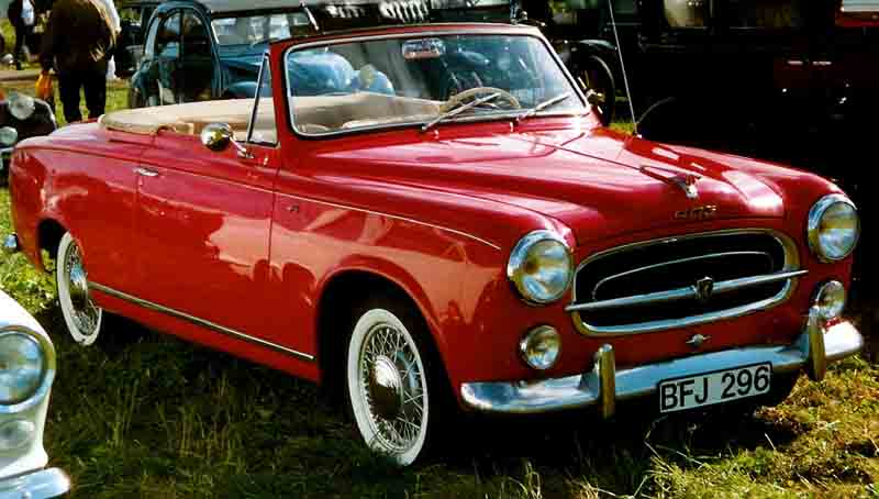 Peugeot 403 Cabriolet 1958